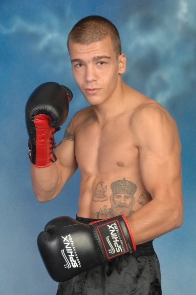 Stefan Stevanovic, srpski bokser